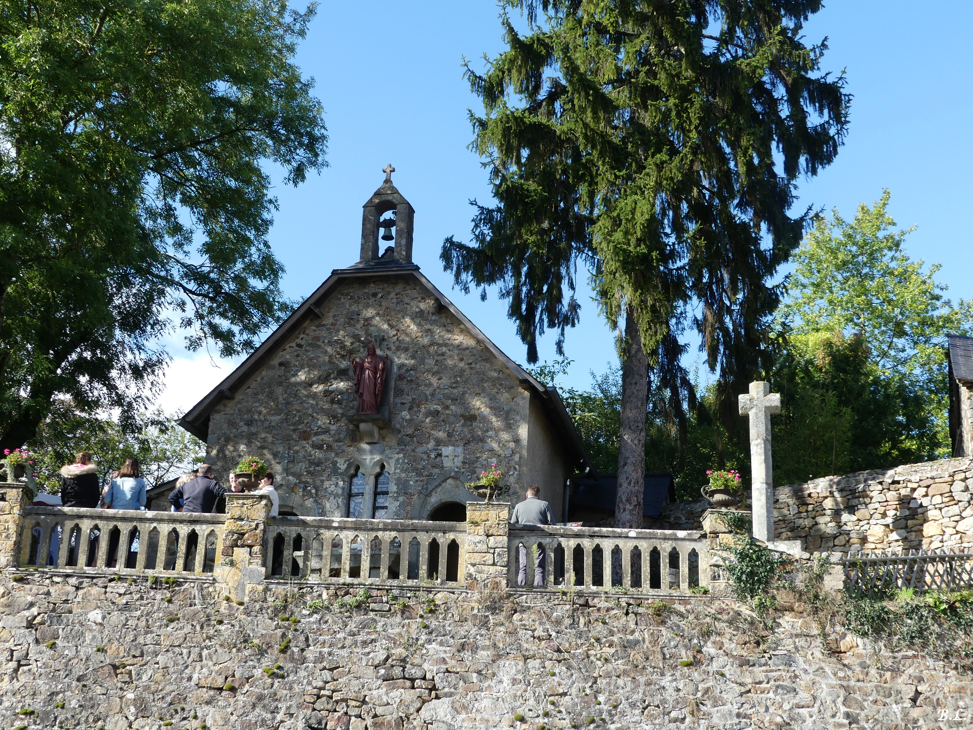 vue extérieur